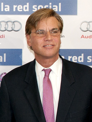 El guionista Aaron Sorkin en el estreno de La red social (The social network) en Madrid, España, el 6 de octubre de 2010.